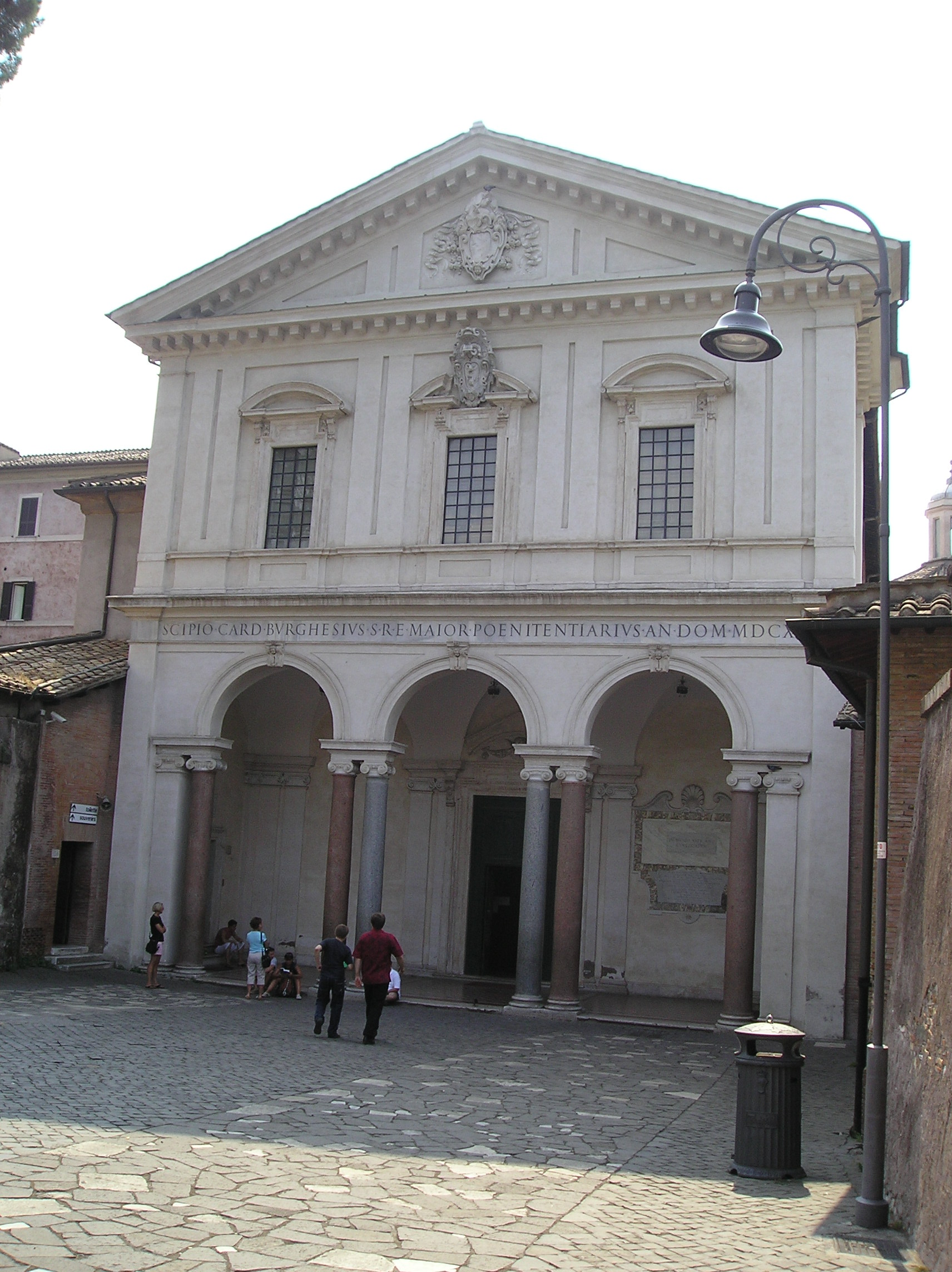 Catacombe 1